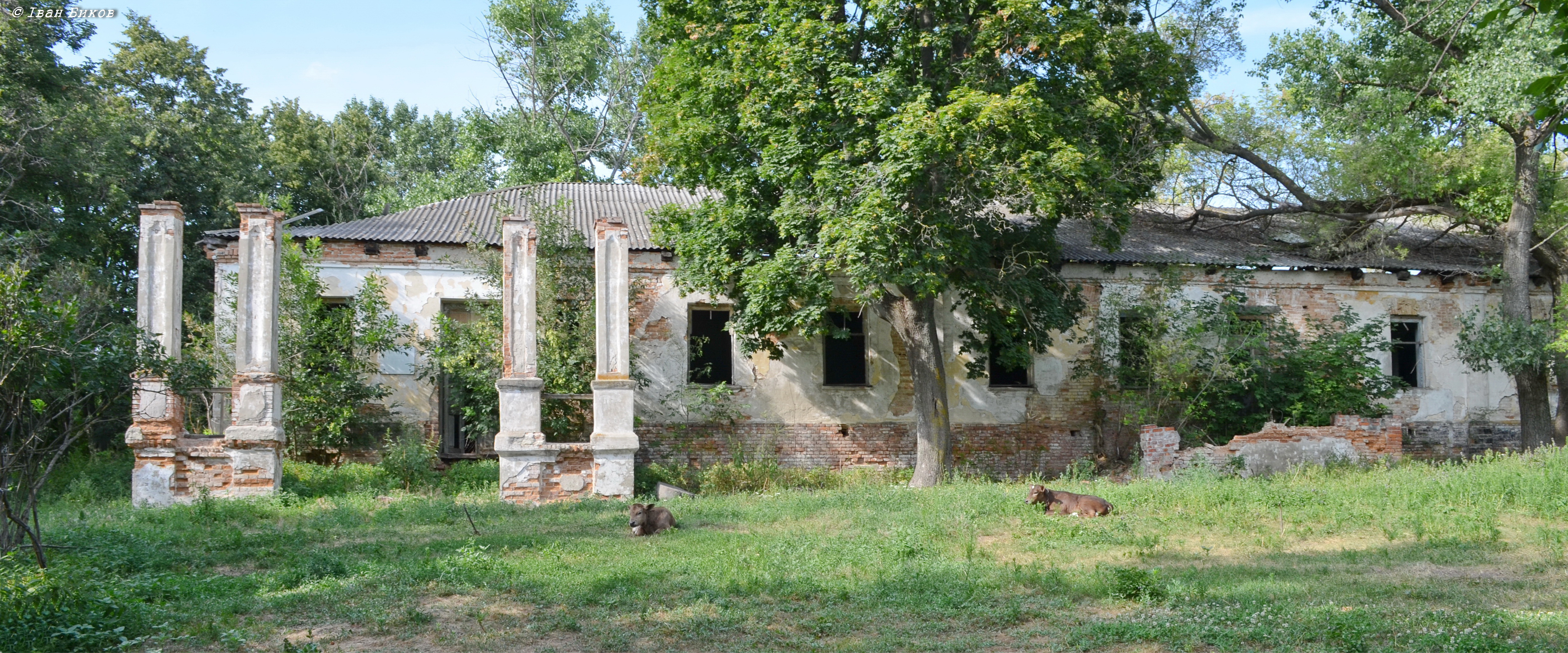 Колишня садиба Лук’яновича, де жив Т.Г.Шевченко в 1845 р.: будинок, комора, дуб, с. Мар’янське